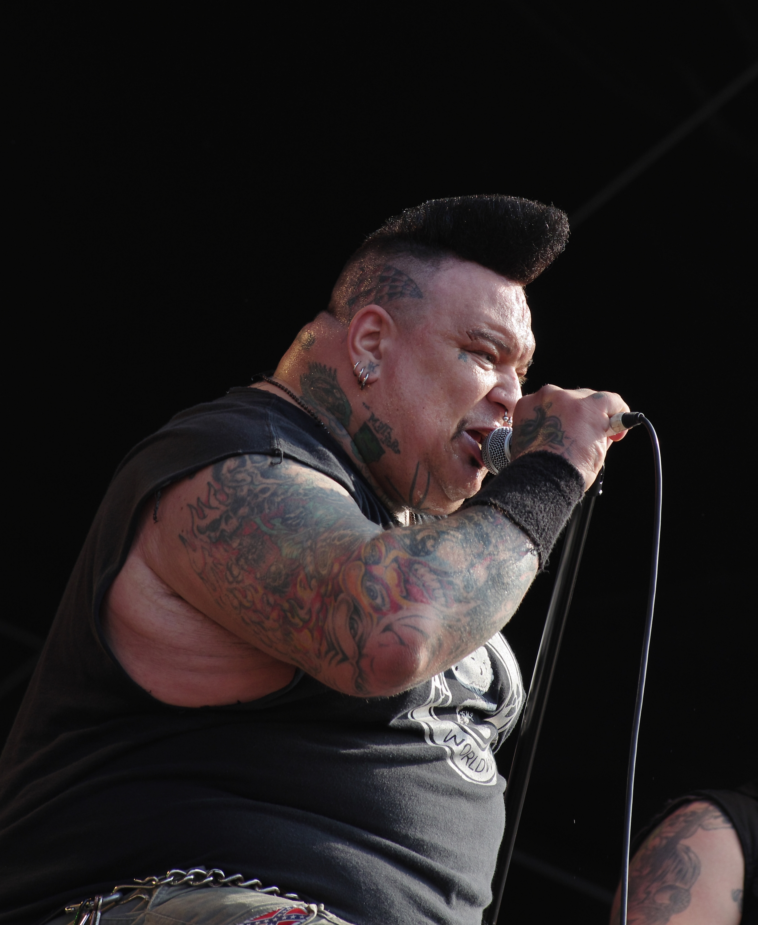 Mad Sin beim Ruhrpott Rodeo 2013. Besetzung: Koefte deVille (Vocals); Stein Dr.Solido (Guitar); Ramon mighty (Guitar); Valle (Double-Bass); Andy Laaf (Drums)